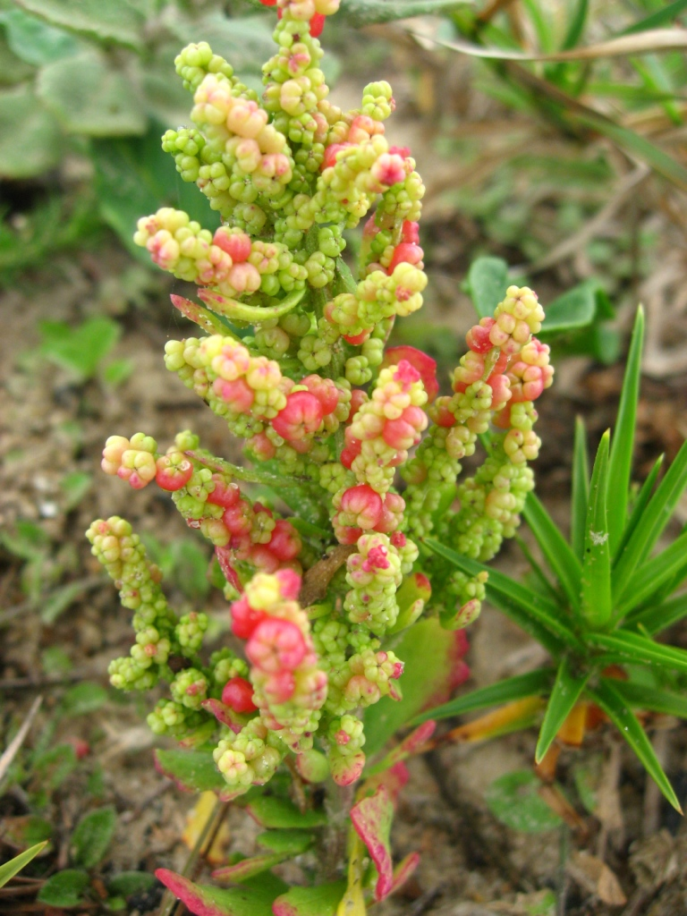 Dysphania retusa (Syn. Chenopodium retusum)- AMARANTHACEAE - Praia do Sonho - Palho�a - SC - Brasil